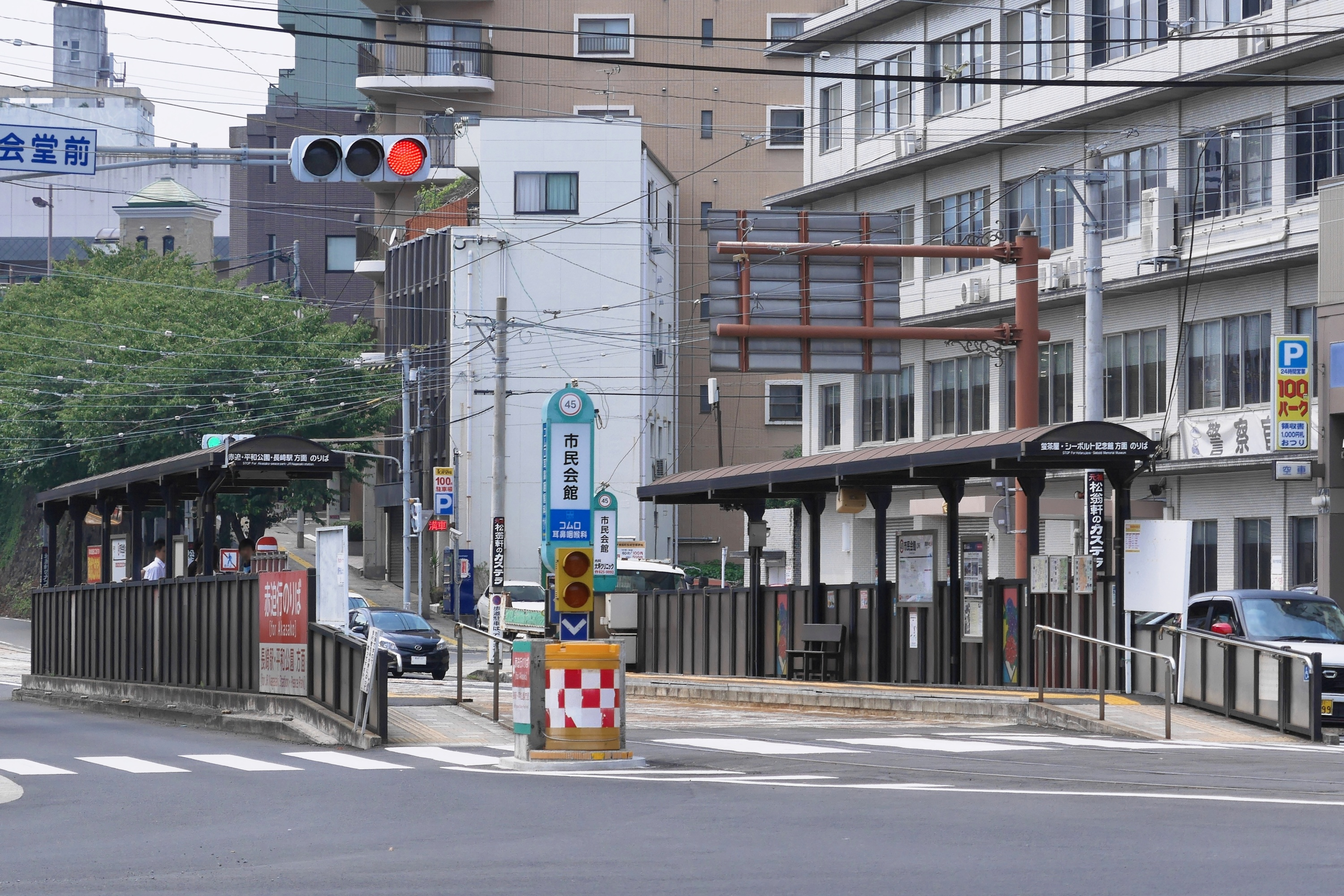 長崎電気軌道の「市民会館（3号系統）」停留所（長崎県長崎市）。